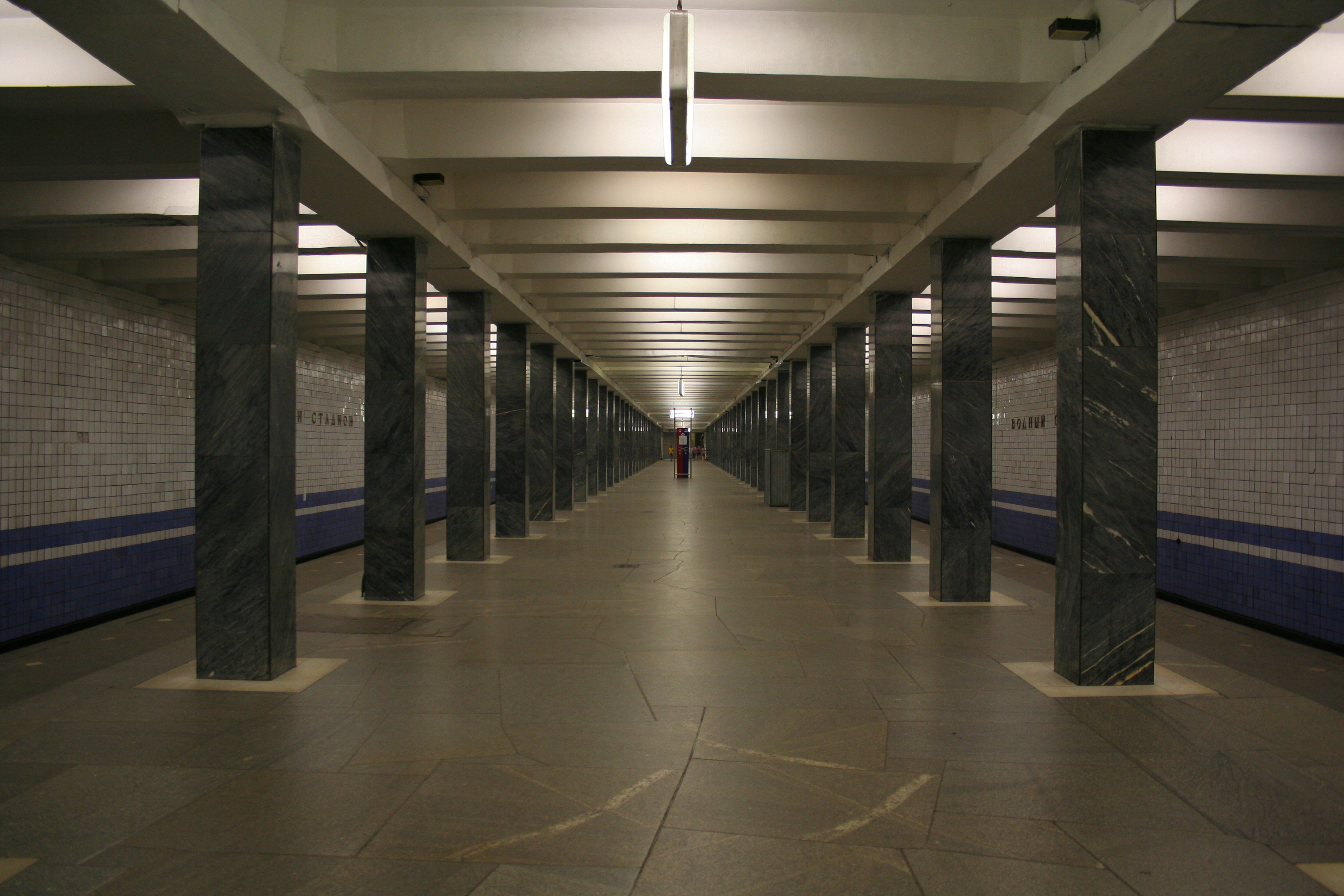 U-Bahnhof Wodny Stadion der Metro Moskau.